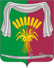 Герб Новопокровского района Краснодарского края